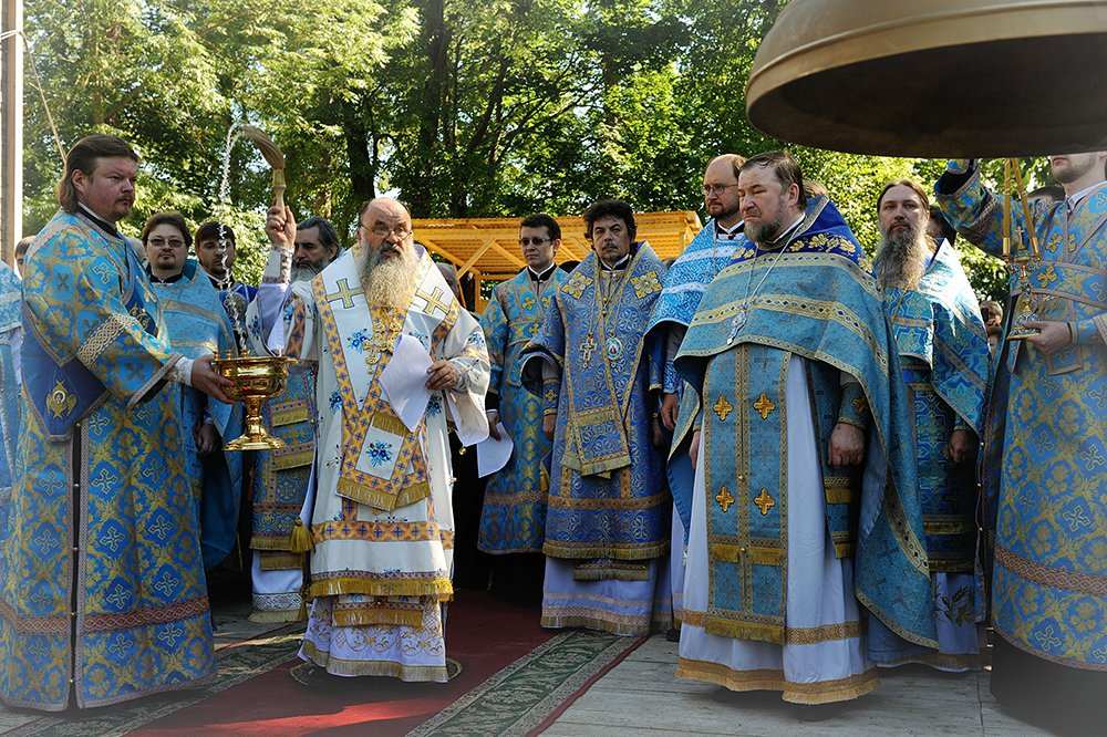 Освящение колокола Церкви Тихвинской иконы Божией Матери (Путилово)